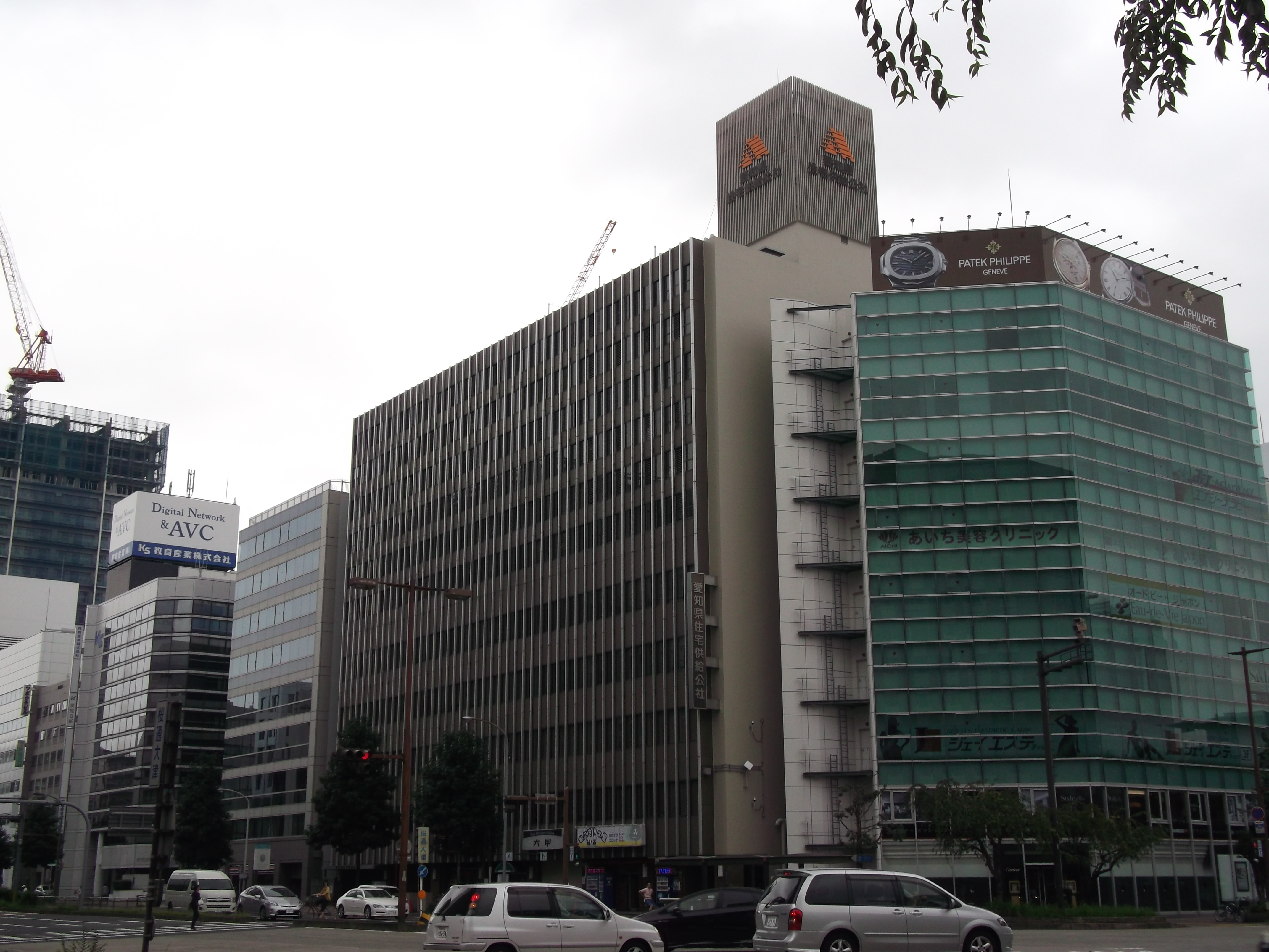 名古屋市中区の愛知県住宅供給公社を南側公道西側より撮影